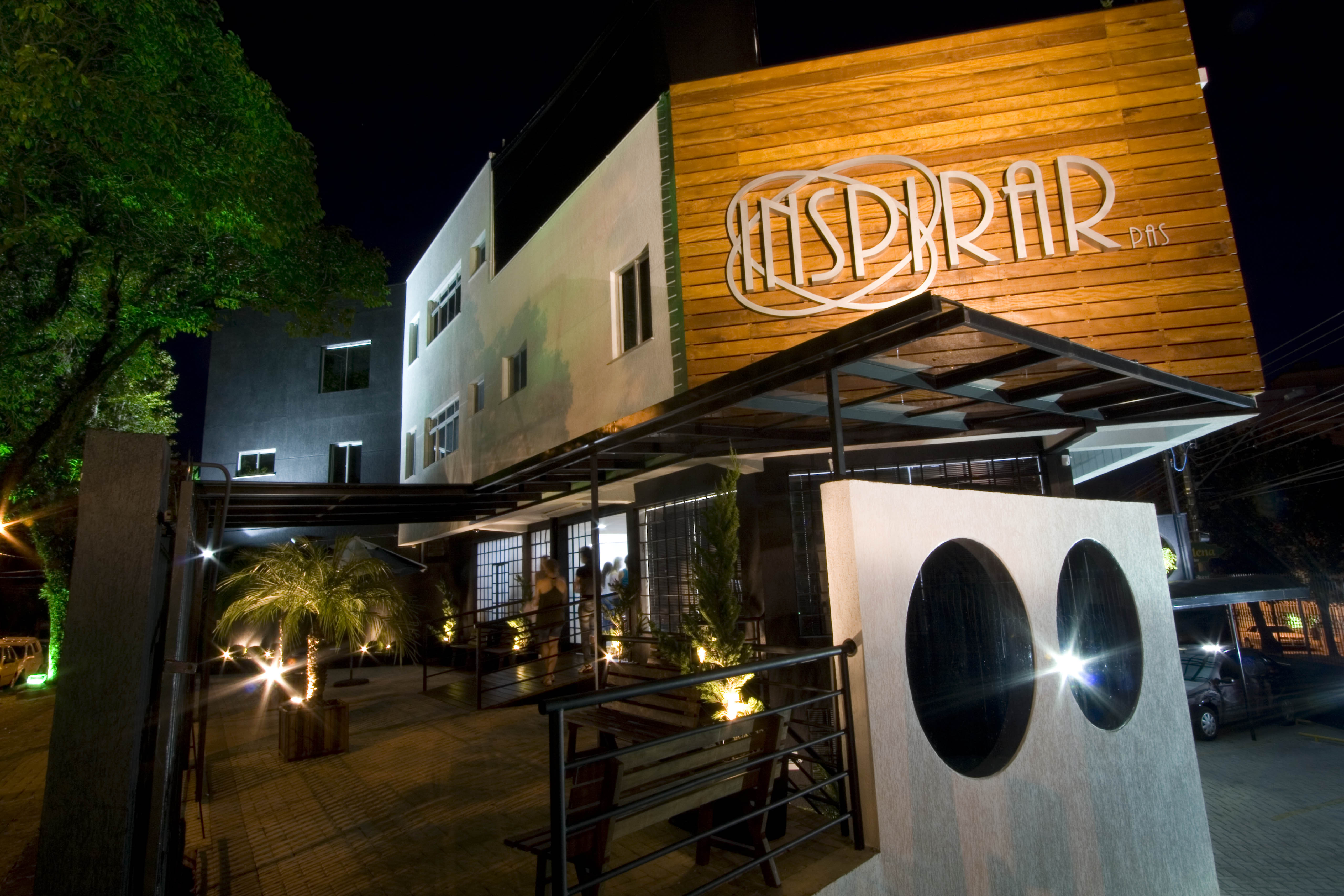 Faculdade Inspirar Sede Curitiba, R. Inácio Lustosa, 792 - São Francisco.